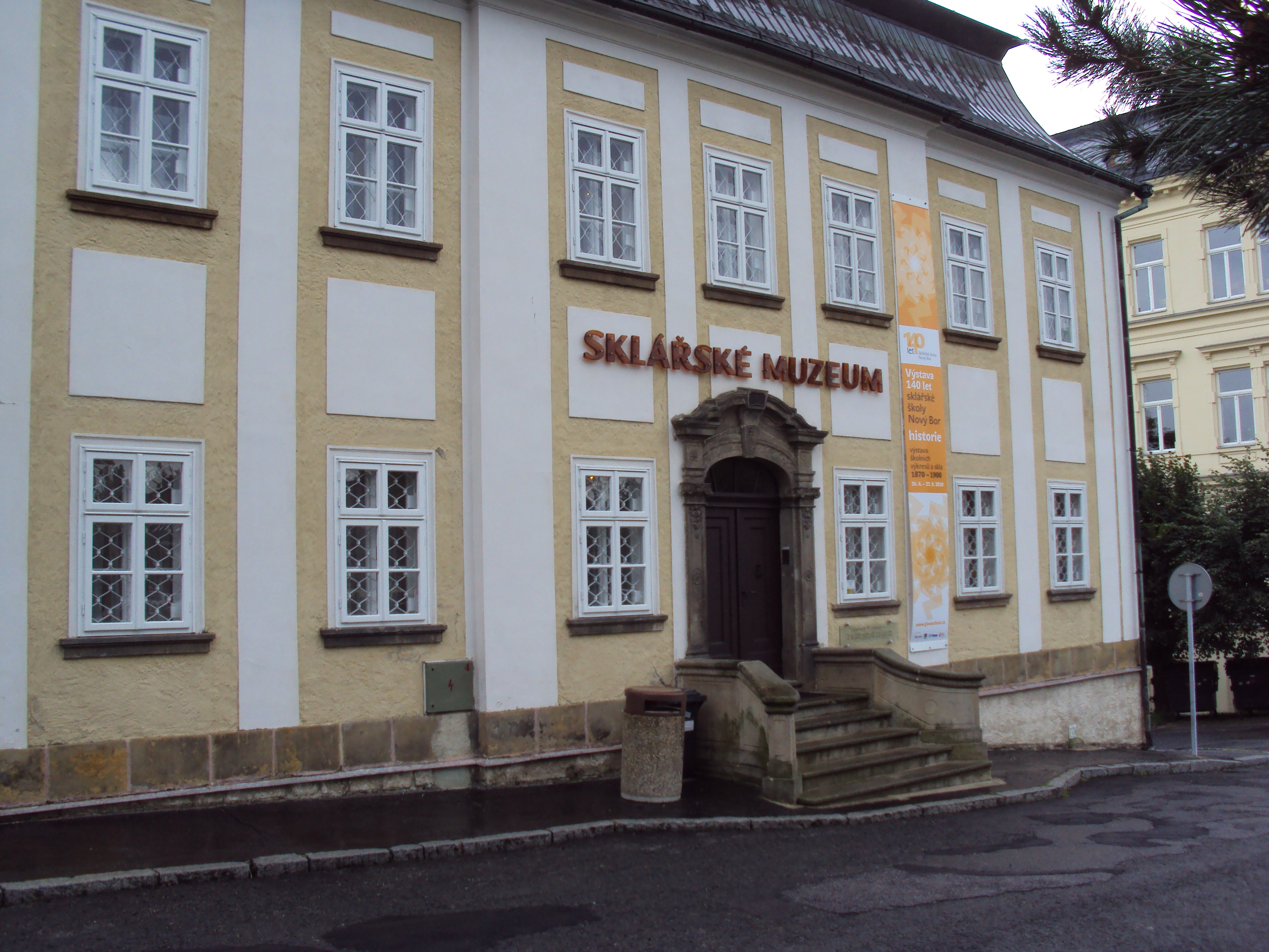 Sklářské muzeum na hlavním náměstí Nového Boru